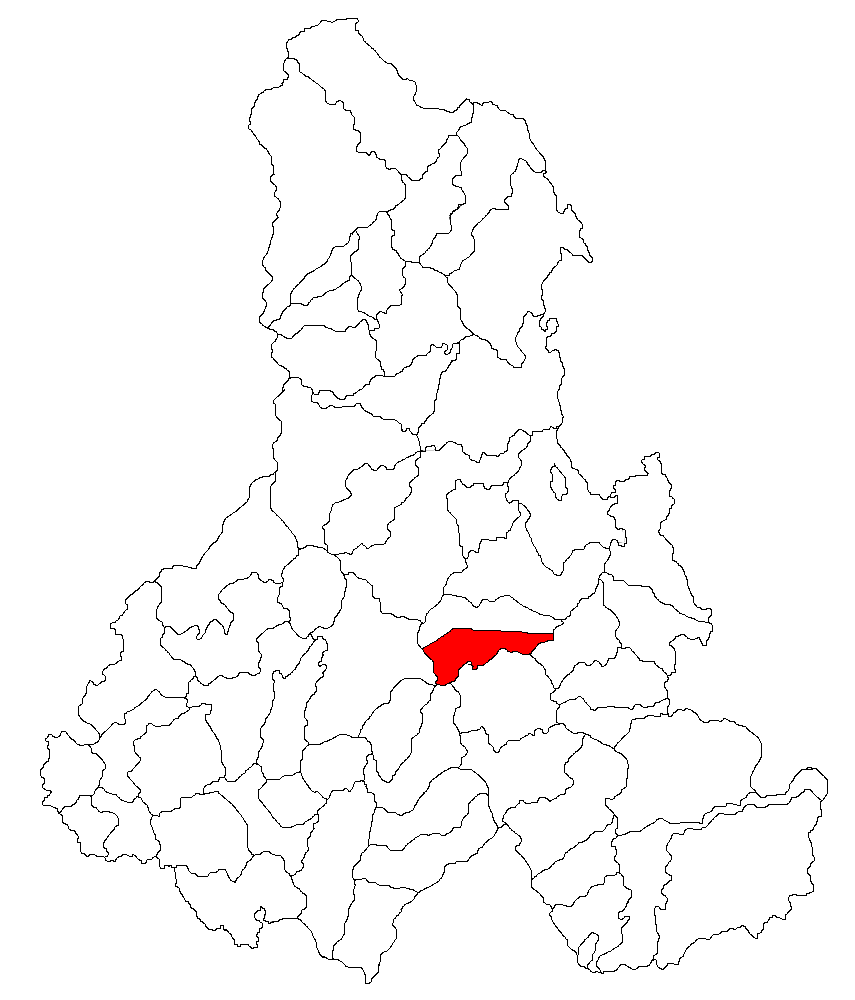 Categorie:Hărţi ale judeţului Harghita Contents 1 Licensing 2 Sursă 3 Licensing 4 Original upload log Licensing Sursă ro::Imagine:Harta_jud_Harghita.png